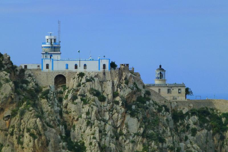 Phare du Cap Carbon